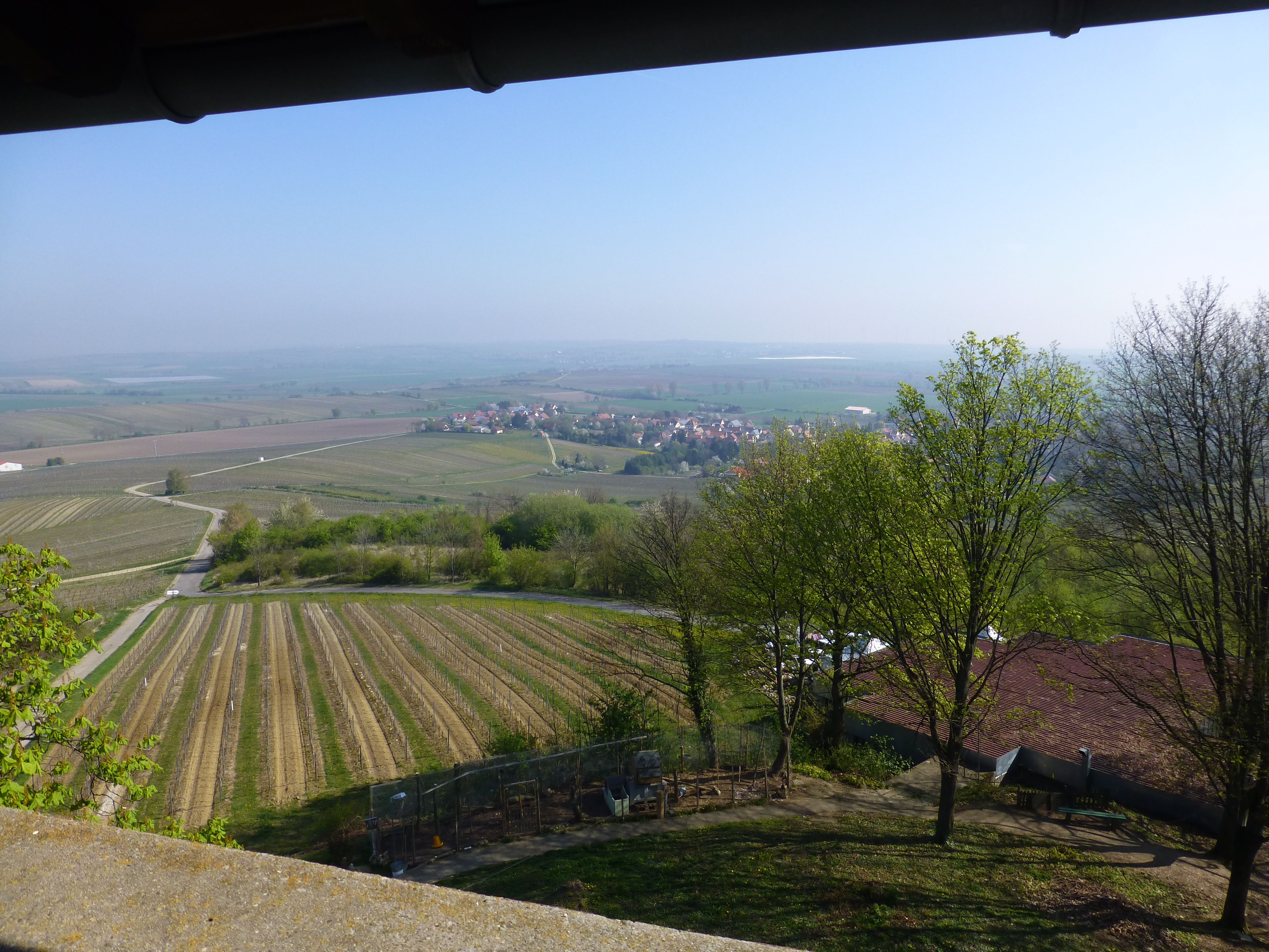 Blick vom Kloppbergturm nach Nordosten in Richtung Dittelsheim-Heßloch